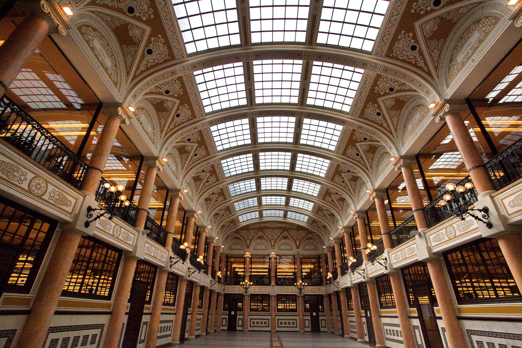 Edificis del complex de l'Antiga fàbrica Can Batlló al carrer Urgell de Barcelona. Edifici del Rellotge